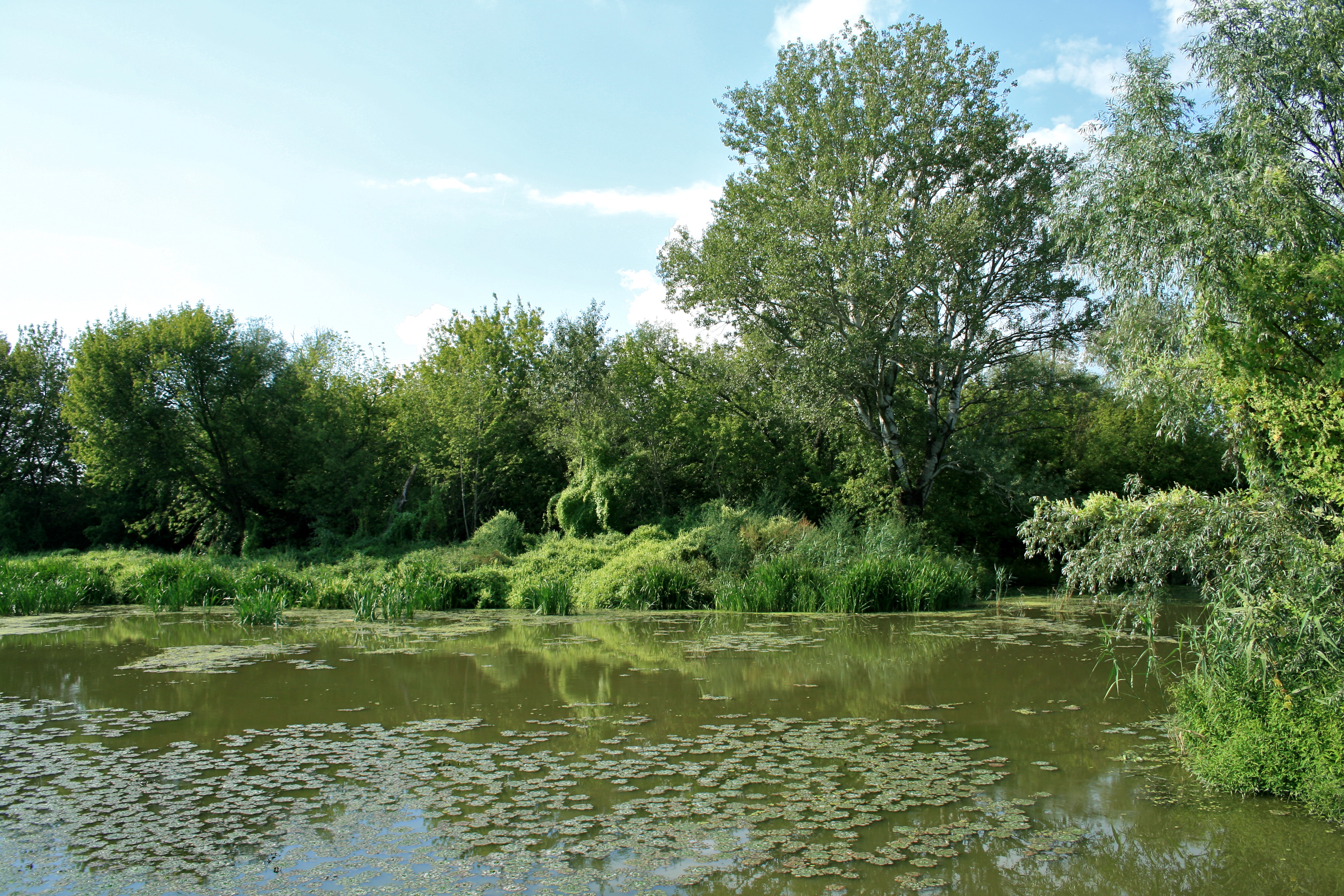 Поглед са стазе здравља